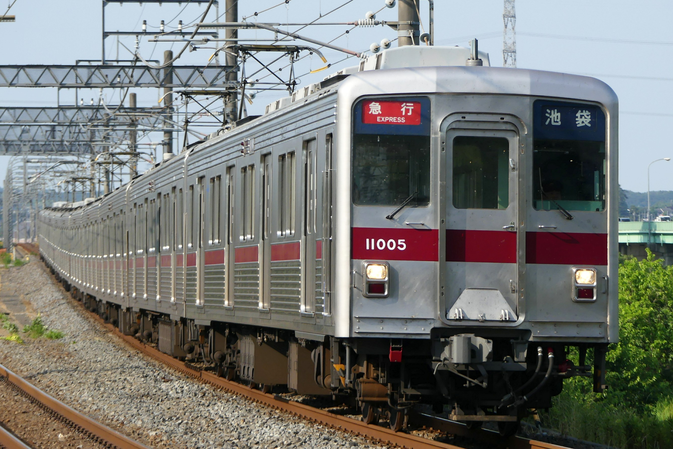 東武鉄道10000系電車